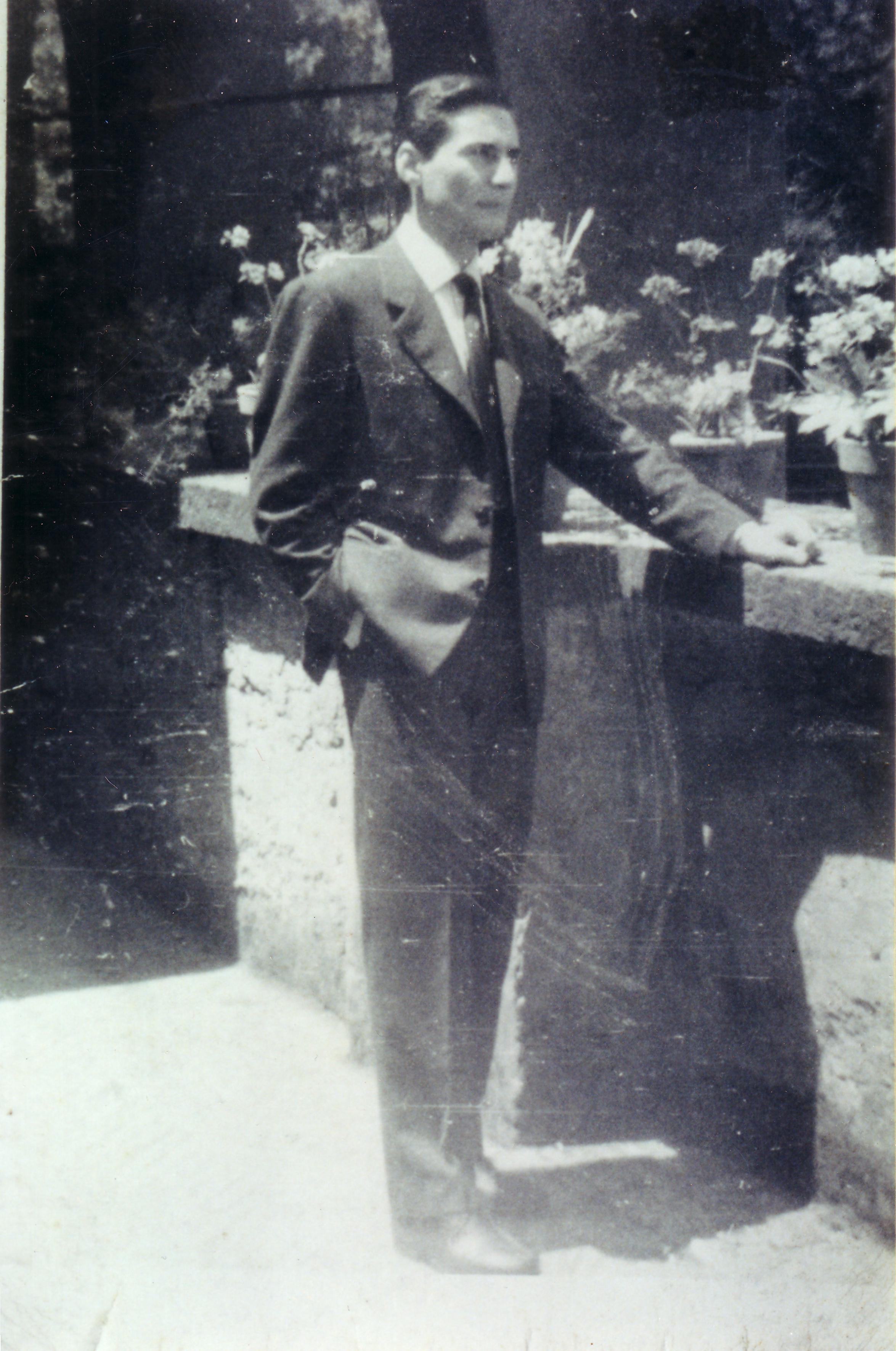 Paolo Salvati Artista Pittore Espressionista Italiano Roma 22 febbraio 1939 Pittore espressionista, ritrattista, tramite l’arte della pittura trova il riscatto lirico all’invadenza razionalistica scientifica, libero da formalismi accademici dipinge soggetti inventati, usa tecniche olio su tela, tempera, pastello. Dipinge la Pietra Blu olio su tela, 1973 1974, raffigurante una grande pietra centrale di colore blu, nel quadro un messaggio intenso, obbligato, sintetizza il percorso di tutti in una pietra da superare, il peso dell'esistenza. Eugenio Montale nel 1973 scrive “La poesia non ha un momento in cui nasce ma è li da sempre come una pietra”. Cerca, trova, dipinge la Poesia anche in altri soggetti, Sogni di Primavera d'Alta Montagna olio su tela 1974 e d’Estate 1975, le tele Alberi Blu 1973 al 2011. Seguirono altri dipinti con la stessa intensità espressiva, la Montagna Gialla 1991, una serie intitolata Fronde Rosse olio su tela, Settembre 1980, Fronde Rosse 1993, 1994, Bosco su Fronde Rosse 1999, numerosi paesaggi inventati, marine, ritratti. Il 13 dicembre 2005, è riconosciuto Cittadino Illustre per meriti artistici, delibera 1103 su bollettino ufficiale 30 gennaio 2006. Il 27 dicembre 2012 su proposta della Presidenza del Consiglio dei Ministri è insignito per meriti artistici del grado di Cavaliere dell'Ordine al Merito della Repubblica Italiana.